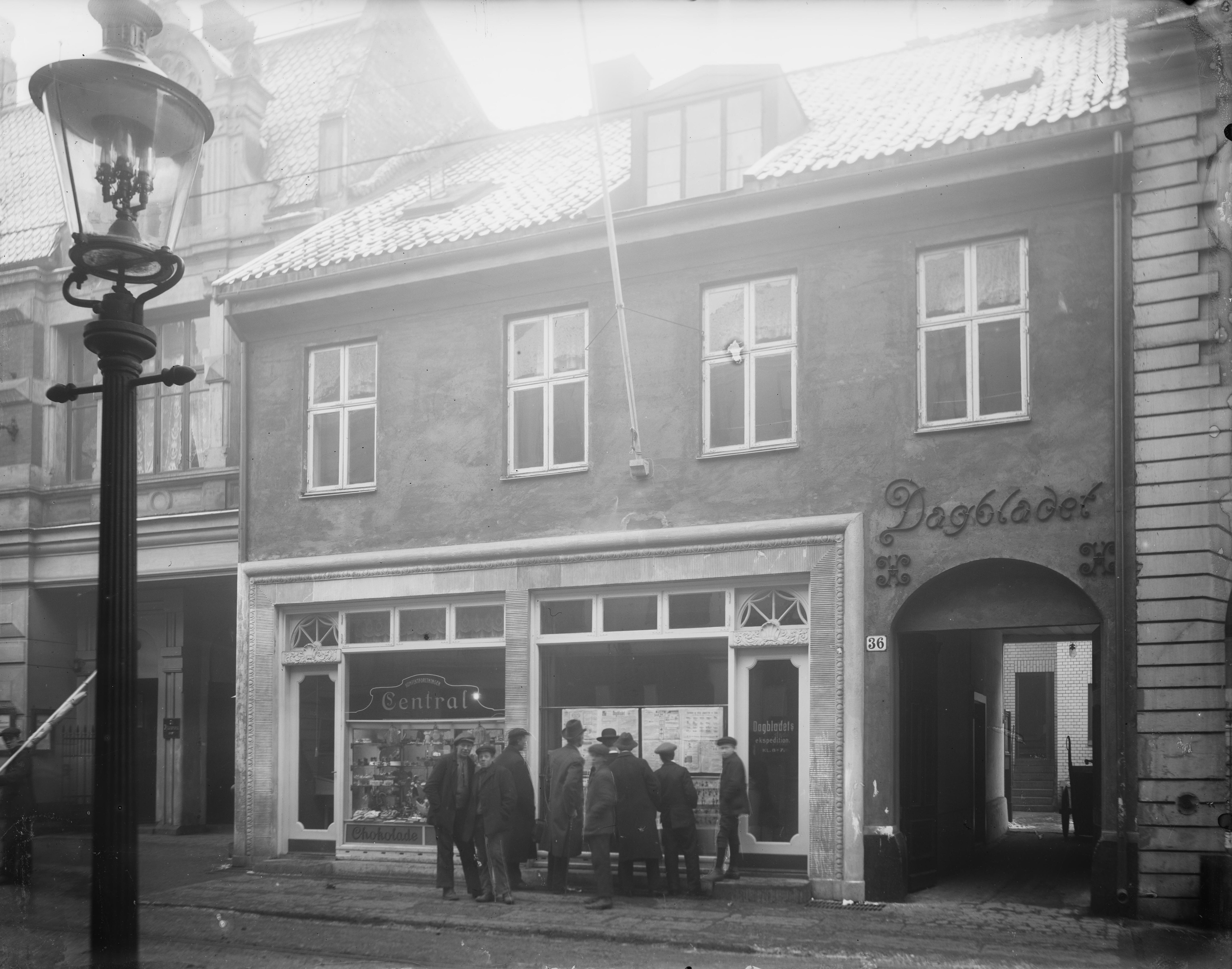 Bildet er hentet fra Nasjonalbibliotekets bildesamling. Anmerkninger til bildet var: Påskrift arkivark: «Dagbladet» Gaarden utvendig Eldste arkivnummer: 980 Yngre arkivnummer: 169 Oslo, Oslo, Oslo, Akersgata 36